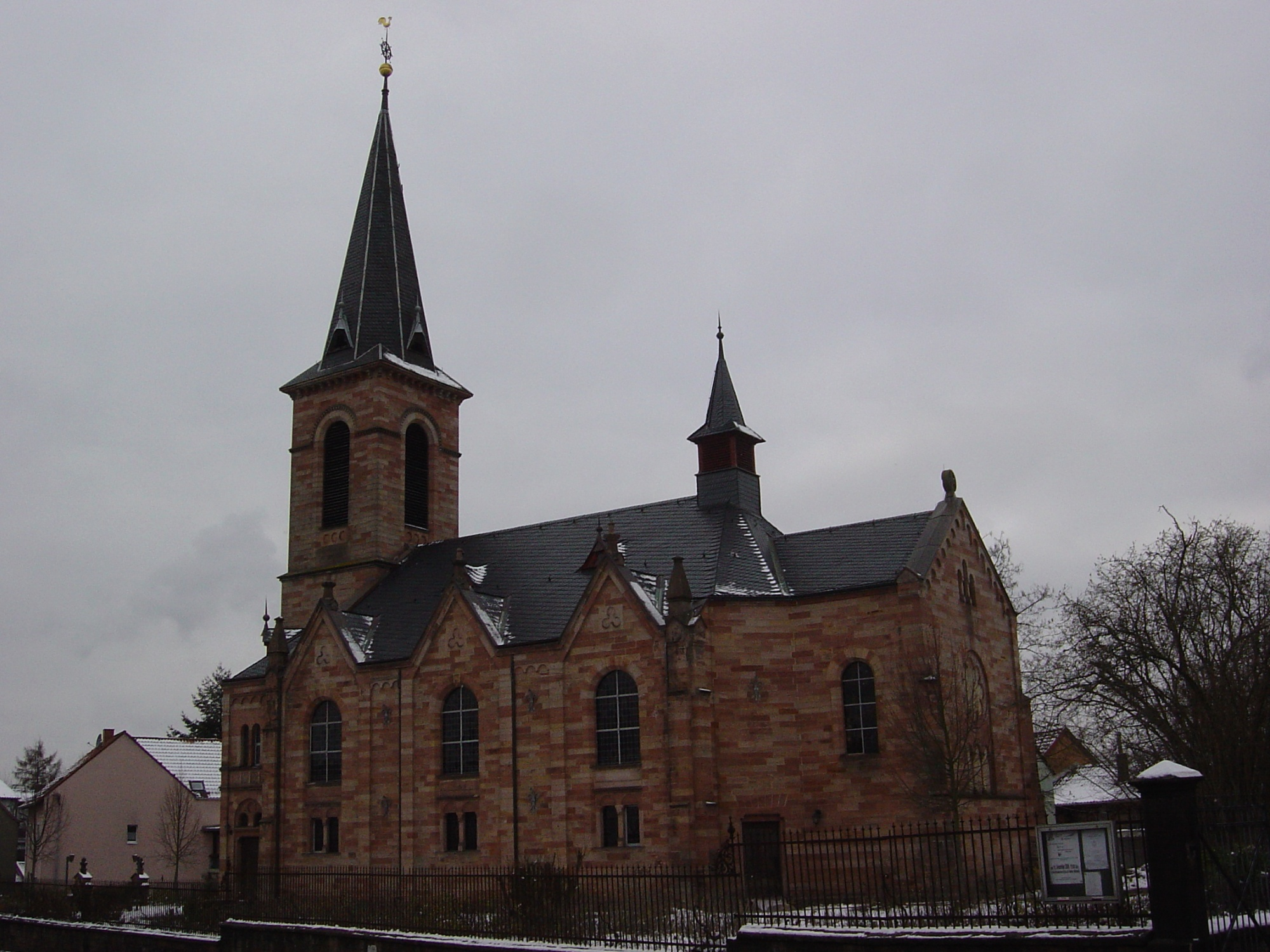 Protestantische Kirche Bexbach, Kleinottweilerstraße, 66450 Bexbach